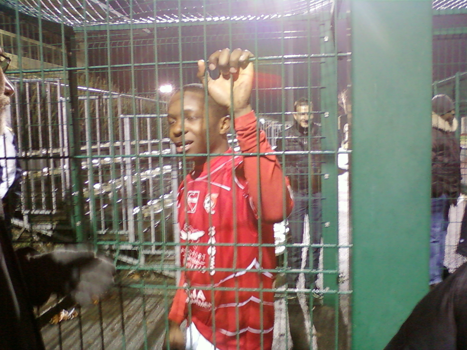 Jérémy Cordoval après le match UJA Alfortville-AS Beauvais.